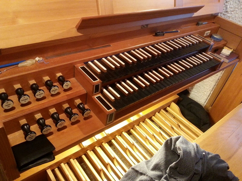 Jerusalemkirche (Taufkirchen)